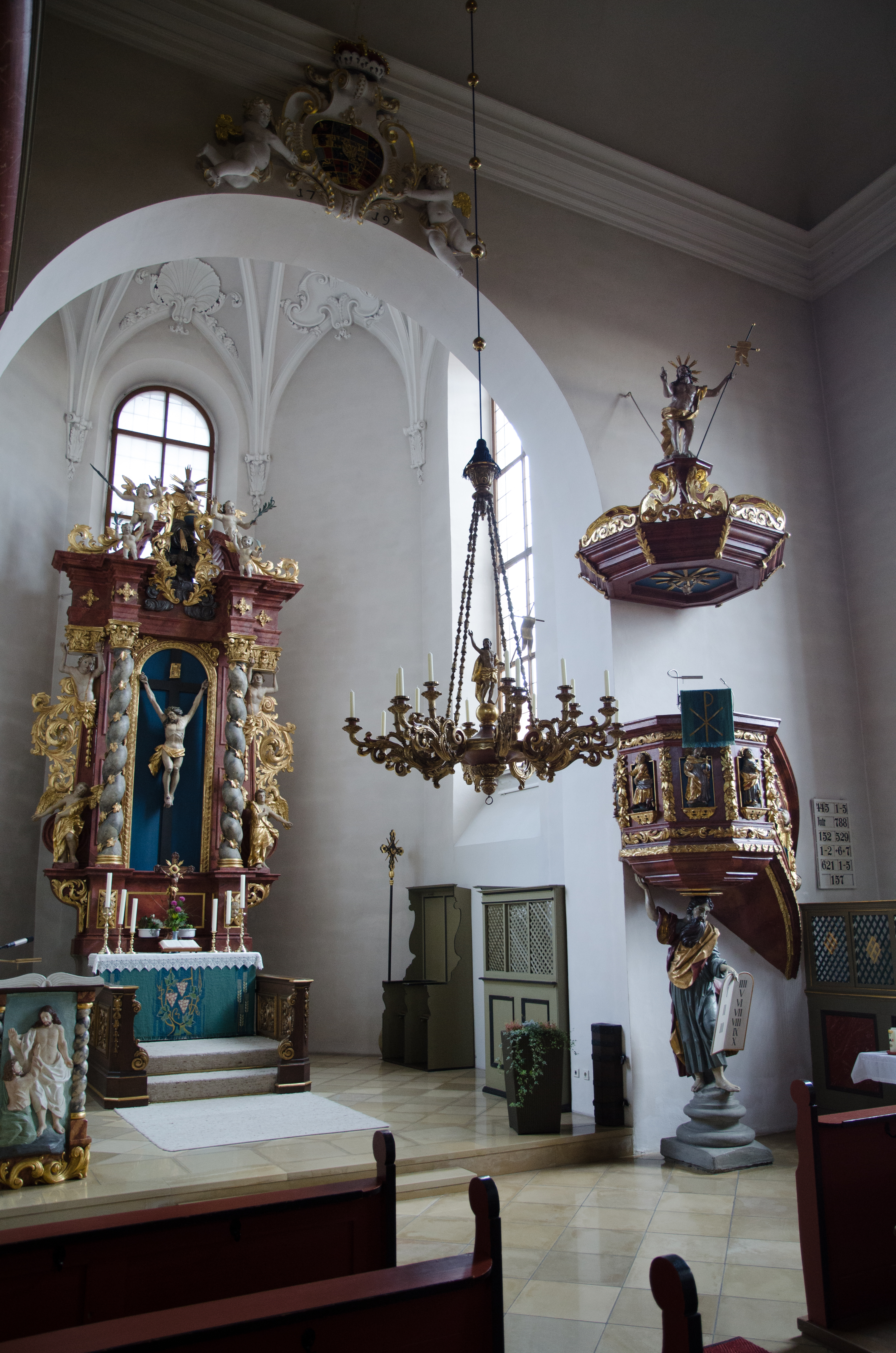 Flachslanden, evang.-luth. Kirche St. Laurentius